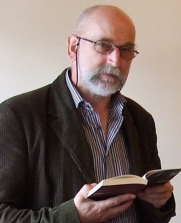 Polski poeta, prozaik, tłumacz Wojciech Pestka.